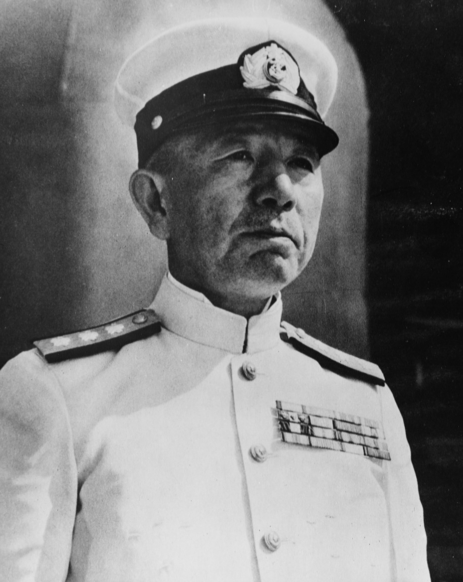 Japanese Admiral Koga Mineichi